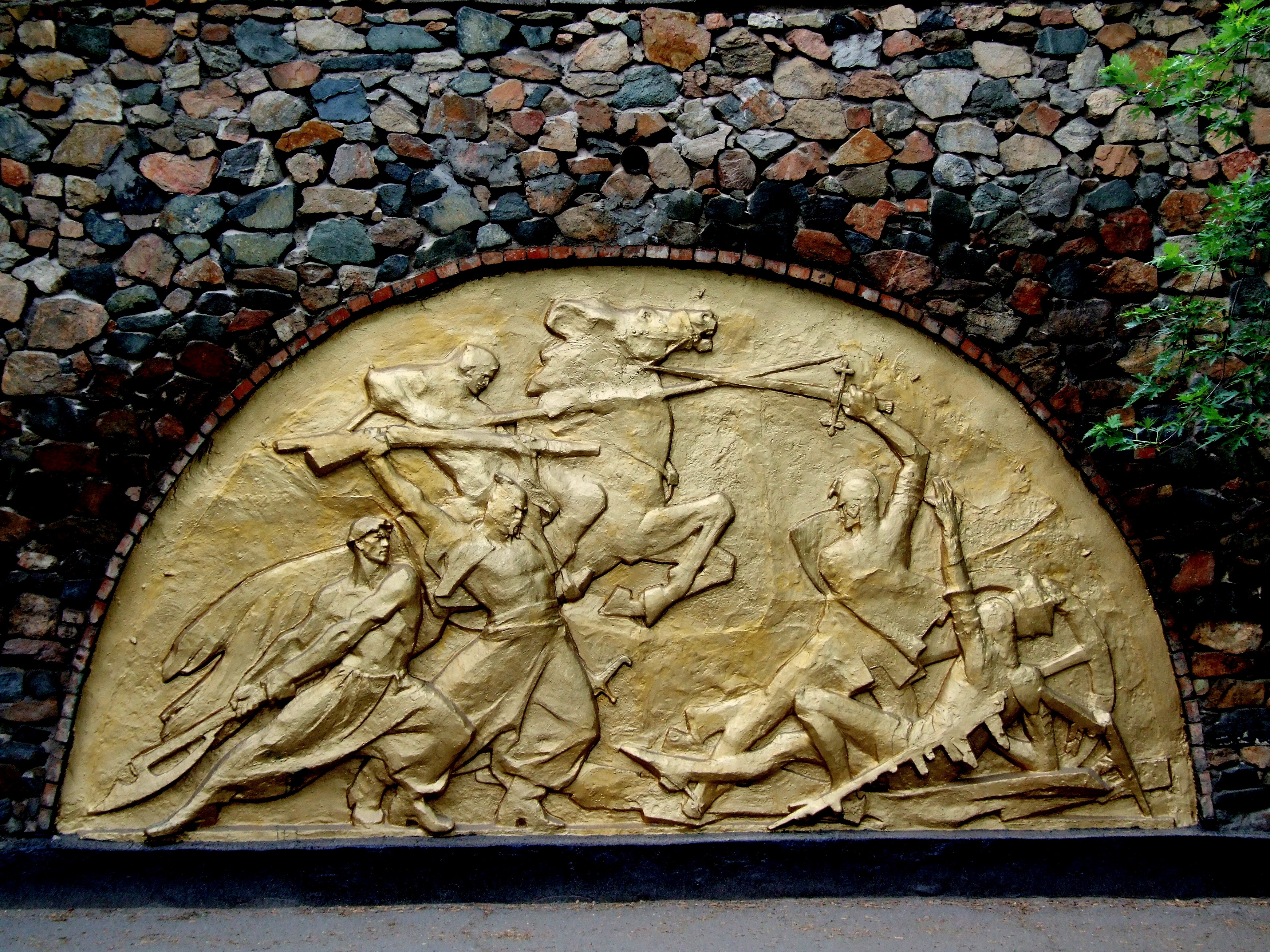 Курган, Жовті Води, вул. Петровського, біля лікарні № 2